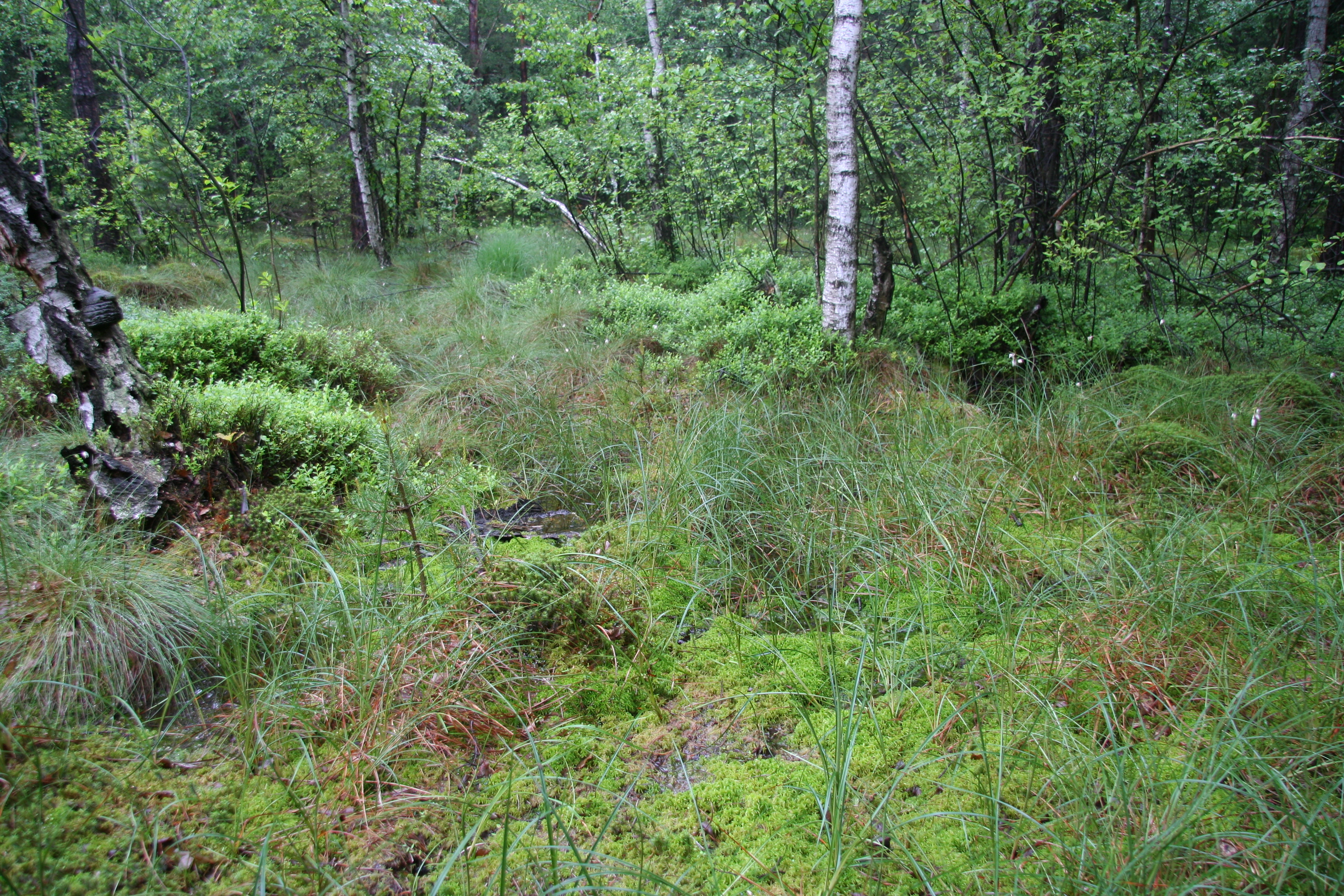 FFH Gebiet "Moorgebiet Moosheide Obercrinitz"